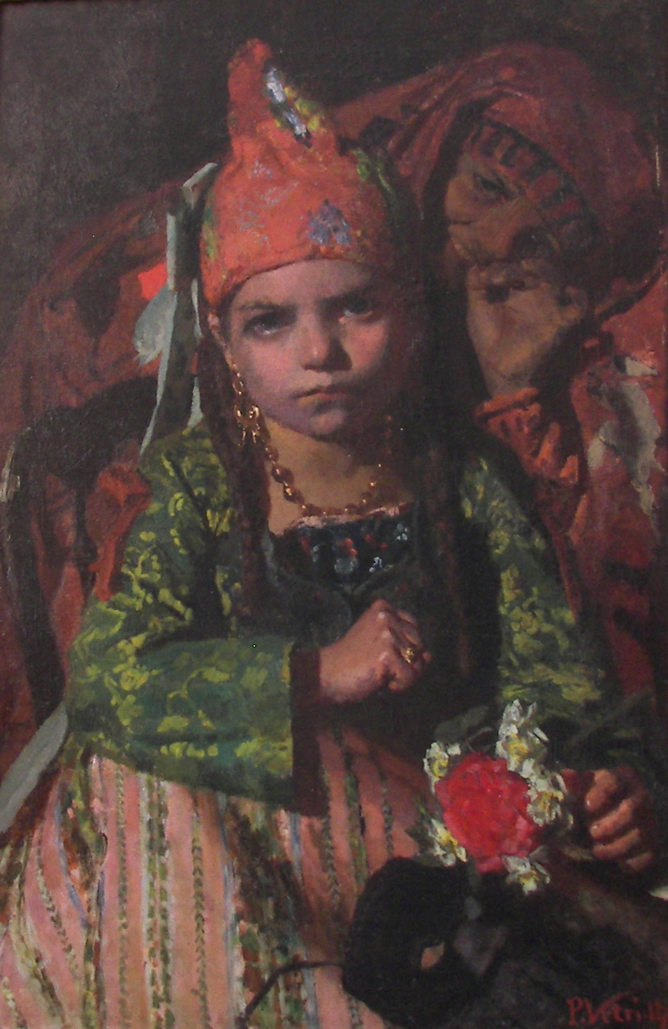 Gypsylabel QS:Lit,"Zingara" label QS:Len,"Gypsy"